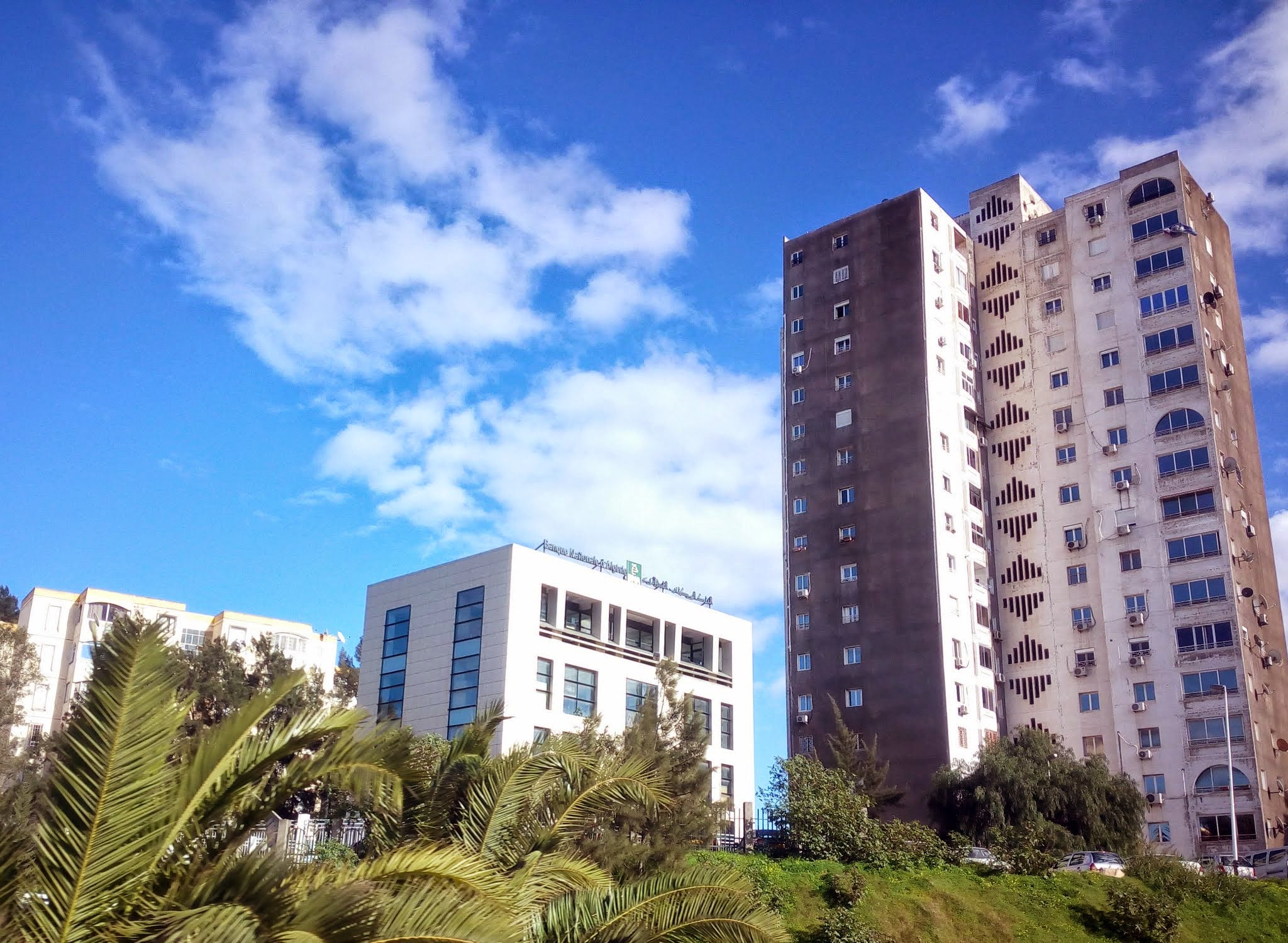 El Biar, Algeria